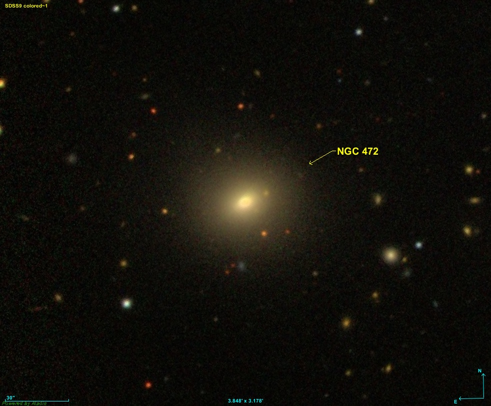 Image créée à l'aide du logiciel Aladin Sky Atlas du Centre de Données astronomiques de Strasbourg et des données de SDSS (Sloan Digital Sky Survey).